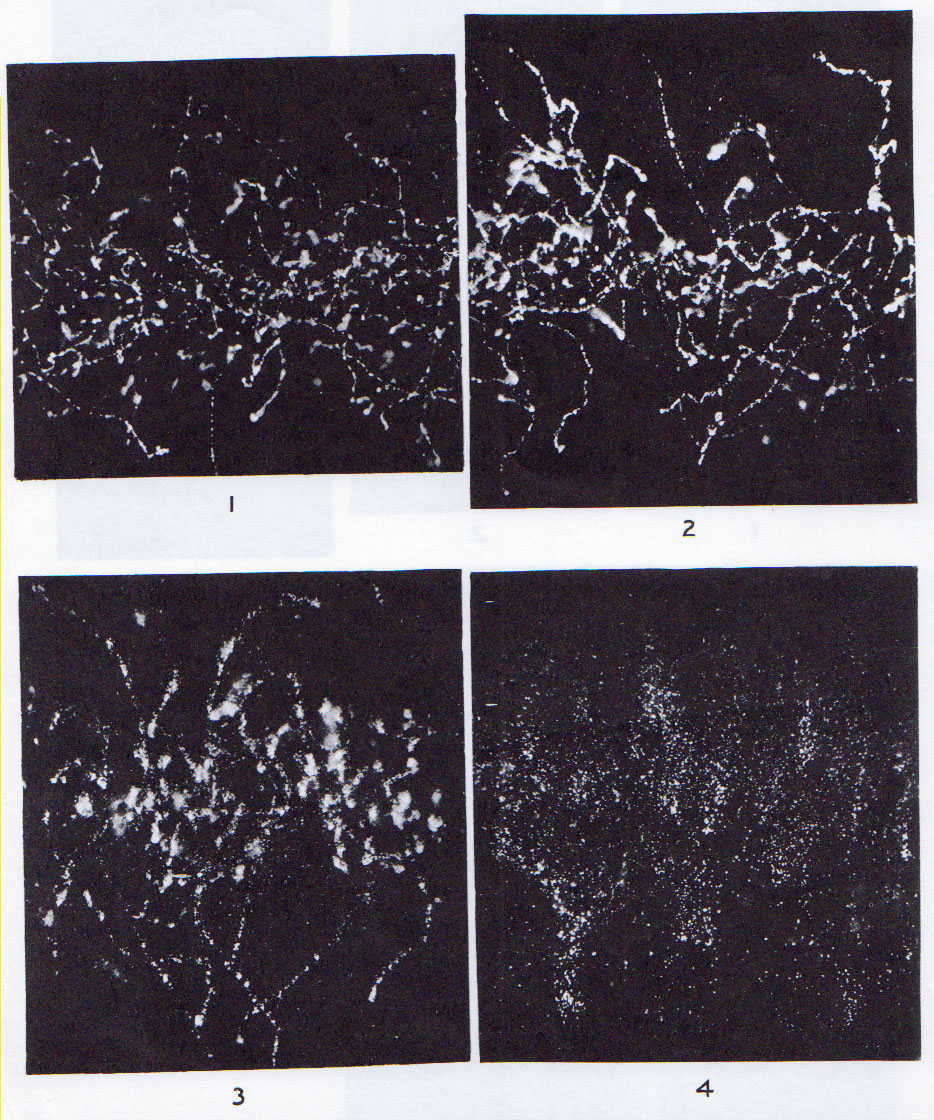 C.T.R.Wilson (1912). “On an Expansion Appeatus for making Visible the Tracks of Ionising Particles in Gases and Resuults obtained by its Use”. Roy.soc,Pric.,A 87: 355-371.にあるＸ線による飛跡。